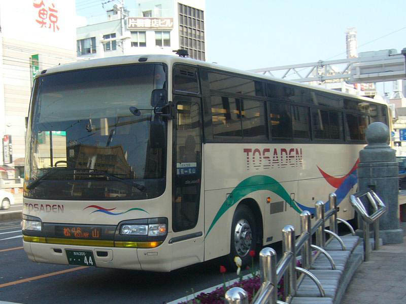 登録番号 高知200か44 土佐電気鉄道所属 ホエールエクスプレス号用 2006年4月8日 はりまや橋にて撮影 撮影者 Tokatsu kokubu